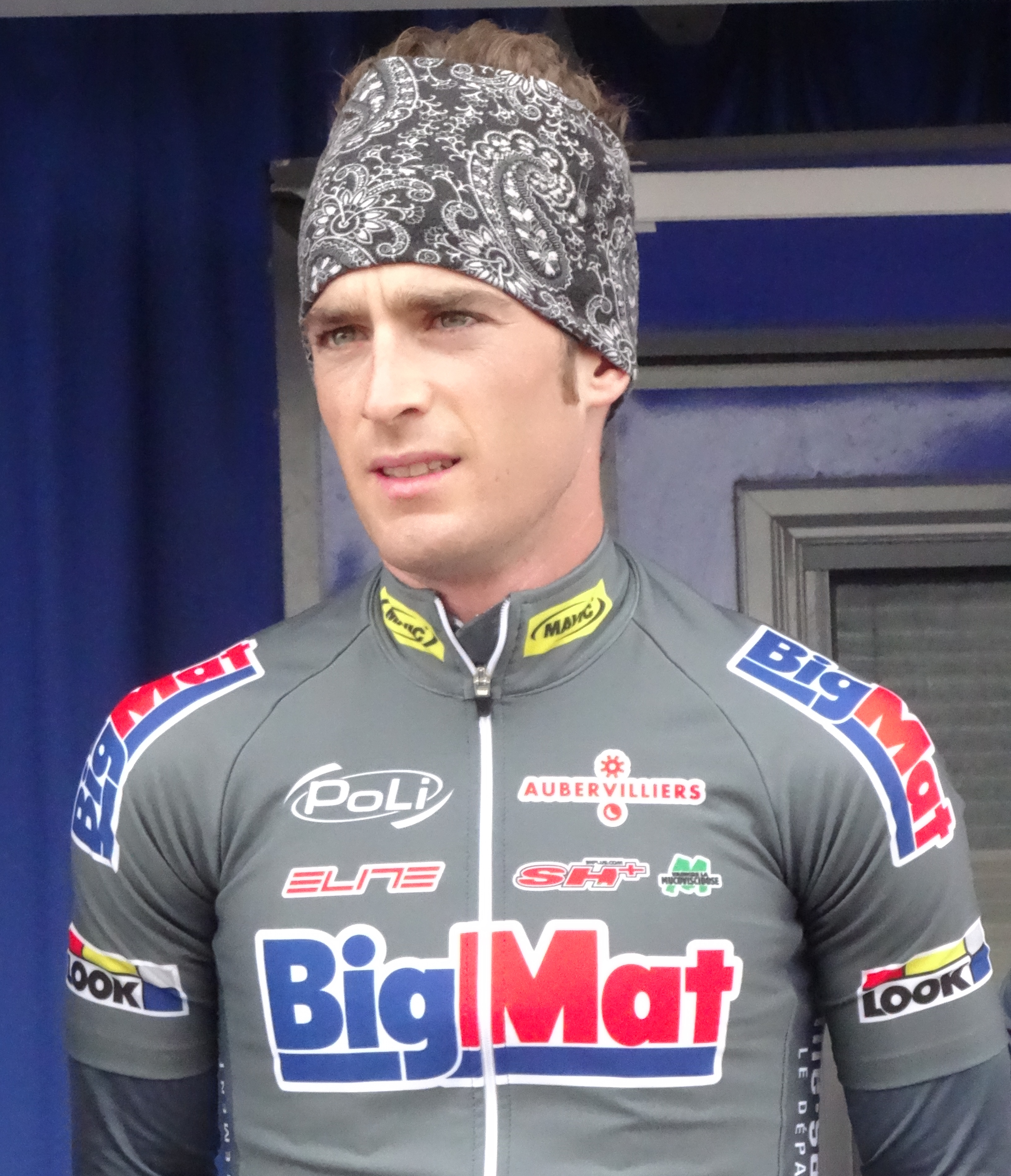 Reportage photographique réalisé le jeudi 8 mai 2014 au départ de la deuxième étape de l'édition 2014 des Quatre jours de Dunkerque à Hazebrouck, Nord, Nord-Pas-de-Calais, France. Depicted person: Théo Vimpère Depicted team: BigMat-Auber 93